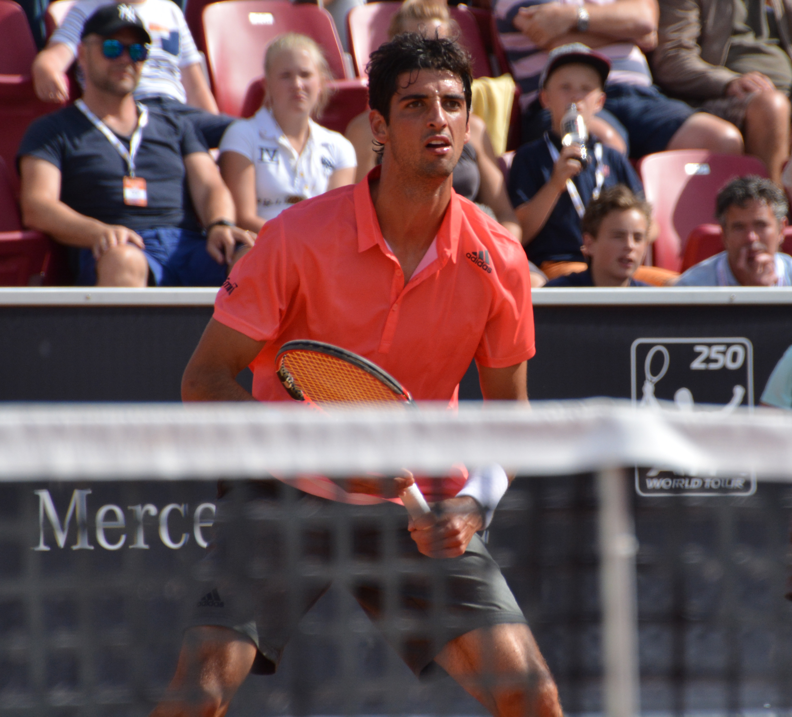 ATP Båstad 2015